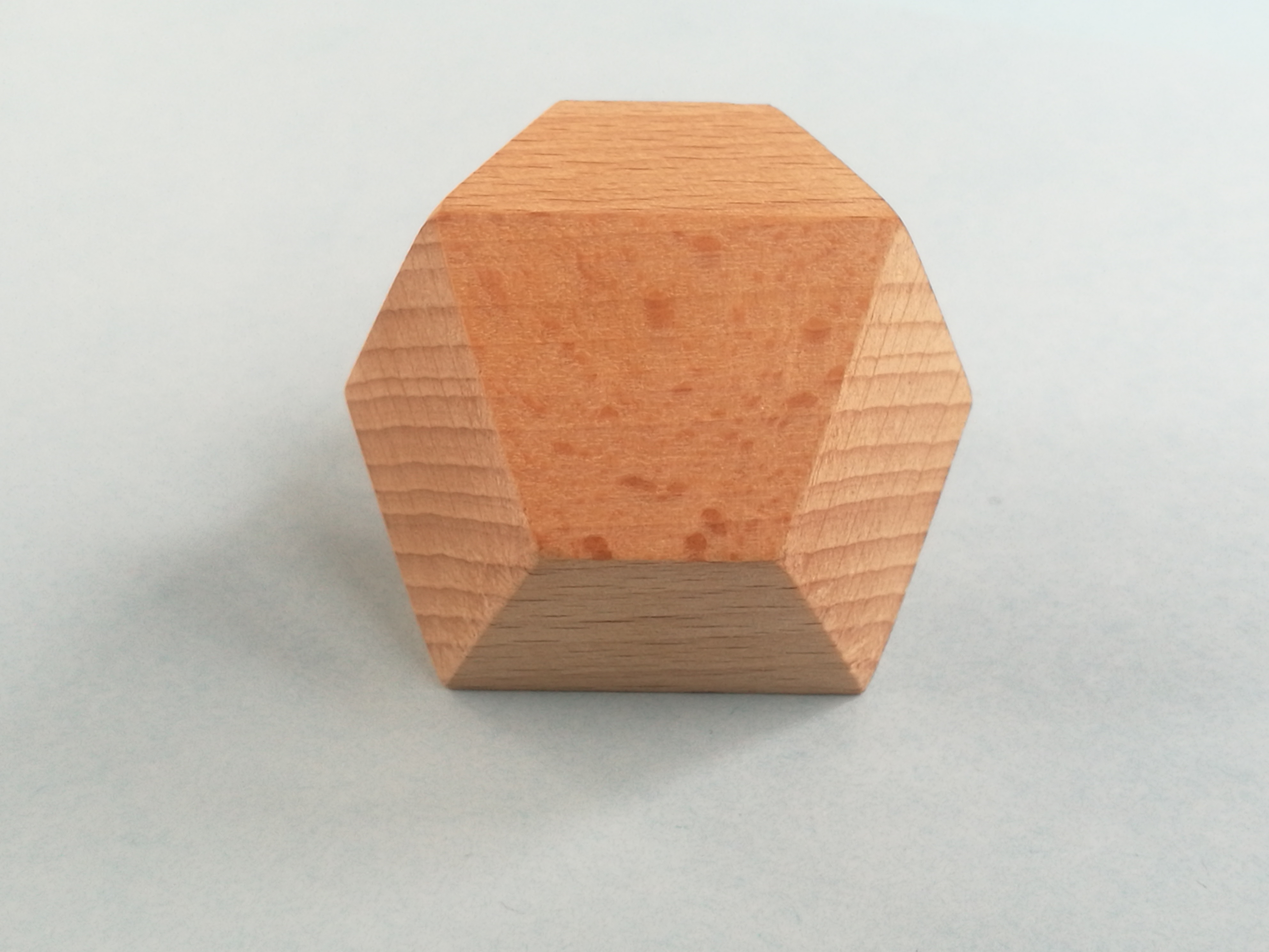 12 síklap által határolt test, melynek övét 6 trapéz alkotja, s az öv két oldalán 3-3 rombusz zárja a térformát.